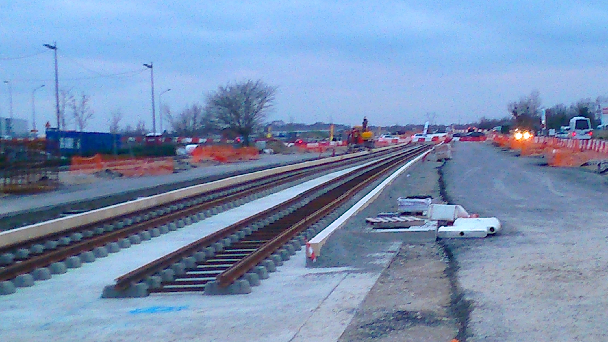 Le chantier du prolongement du tramway T1 vers le nouveau Parc des Expositions de Toulouse Métropole.